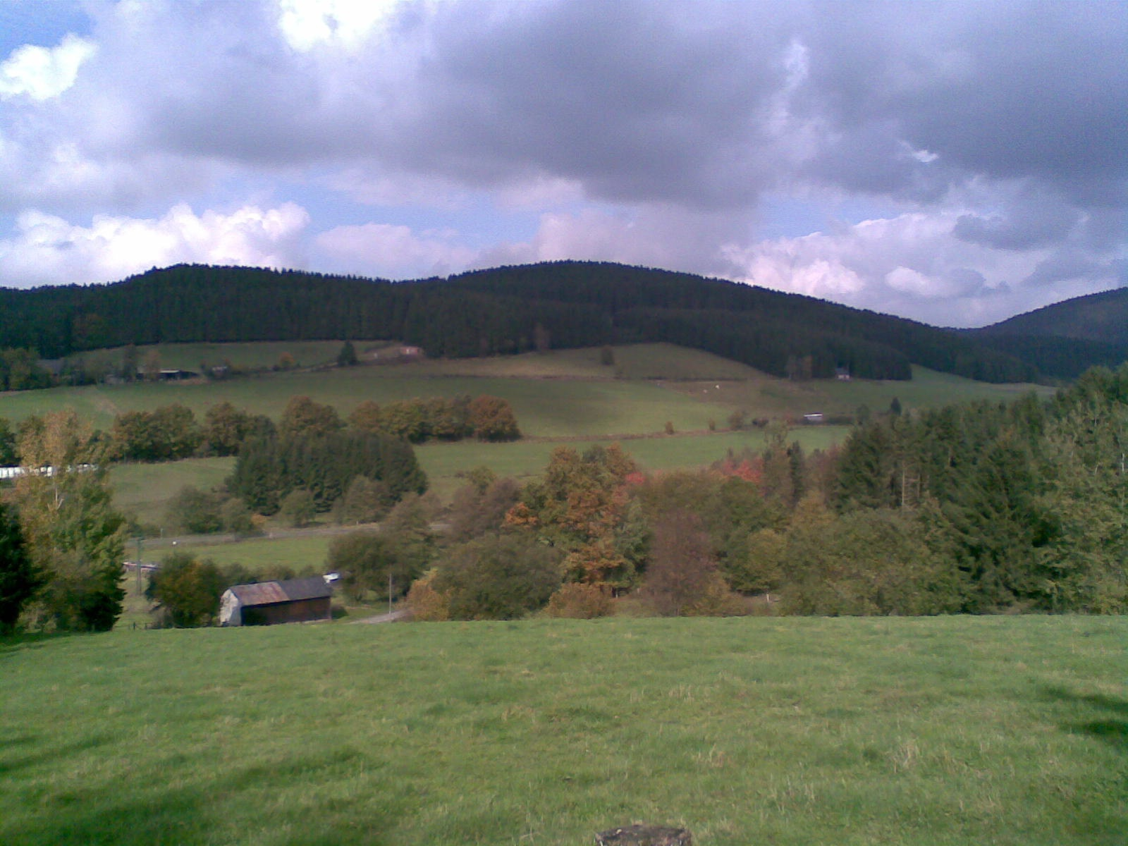 Wittgensteiner Land bei Bad Berleburg-Wemlighausen / Wittgenstein near Berleburg-Wemlighausen